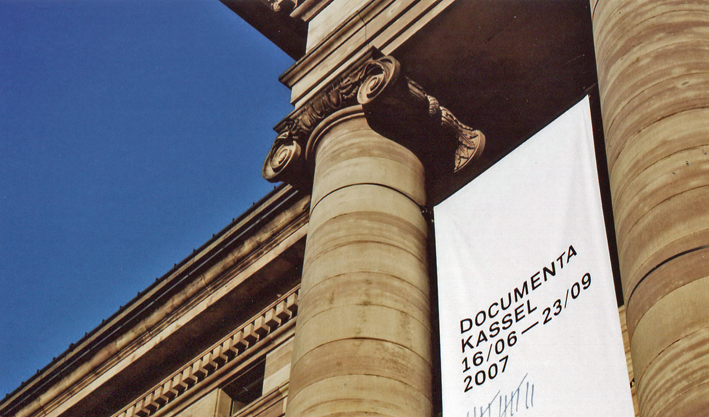 documenta 12 am schloss wilhelmshöhe